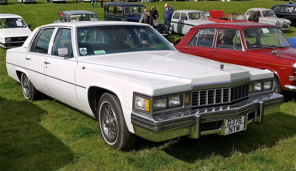 Panasonic G1 14-45 Lens